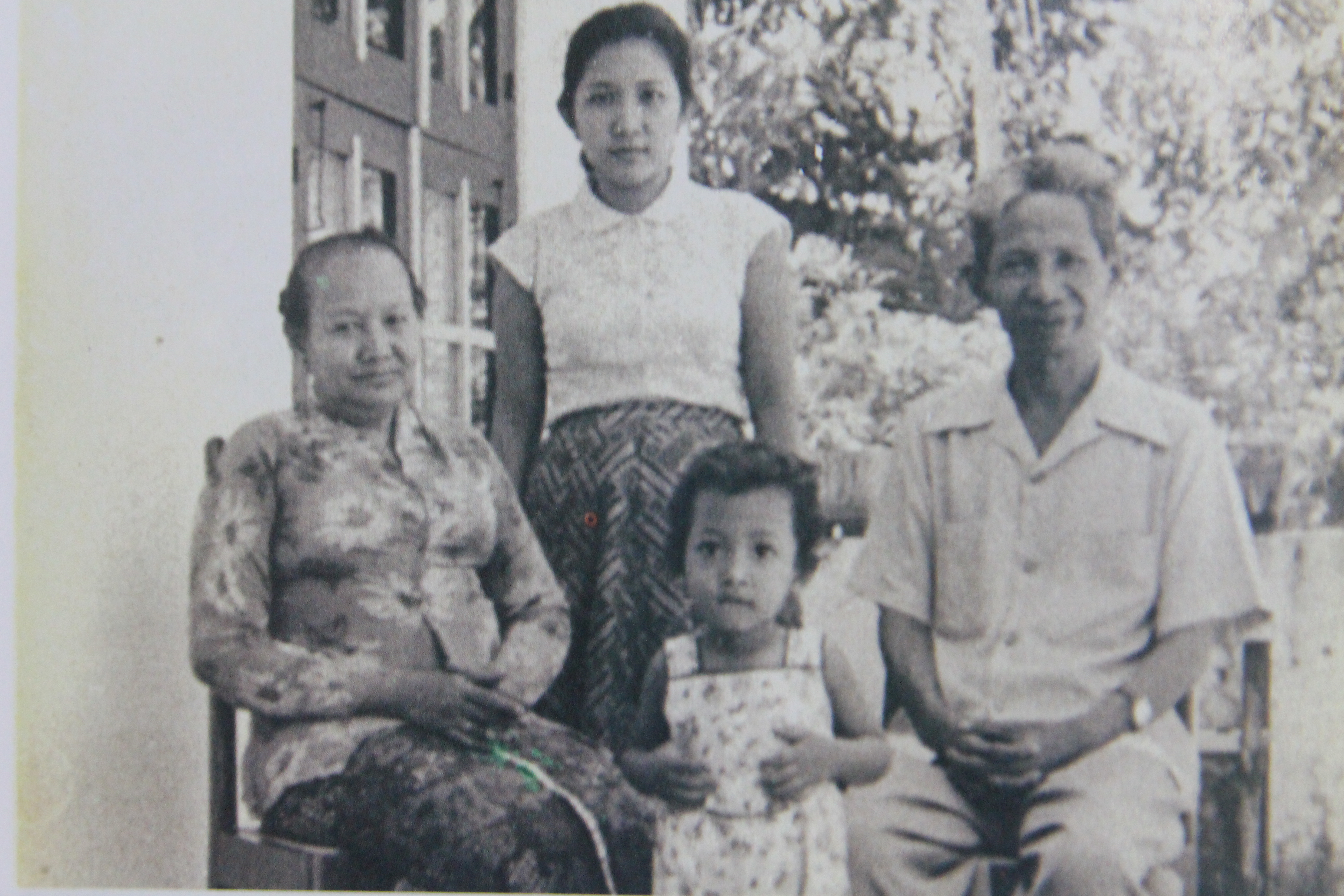 Bersama Kapten Sunarto